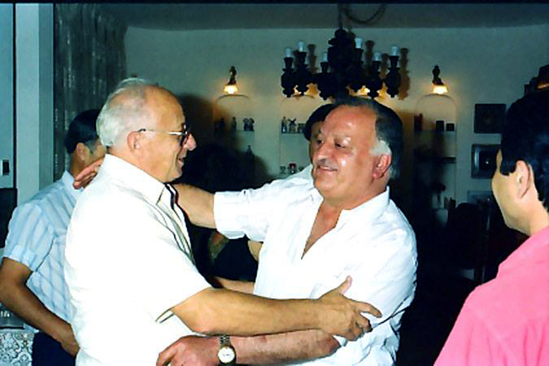 אלי אפללו המכונה השליש, שהשתתף בפיצוץ מלון המלך דוד בפגישה עם יחיאל קדישאי יד ימינו ואיש סודו של מפקד האצ"ל מנחם בגין